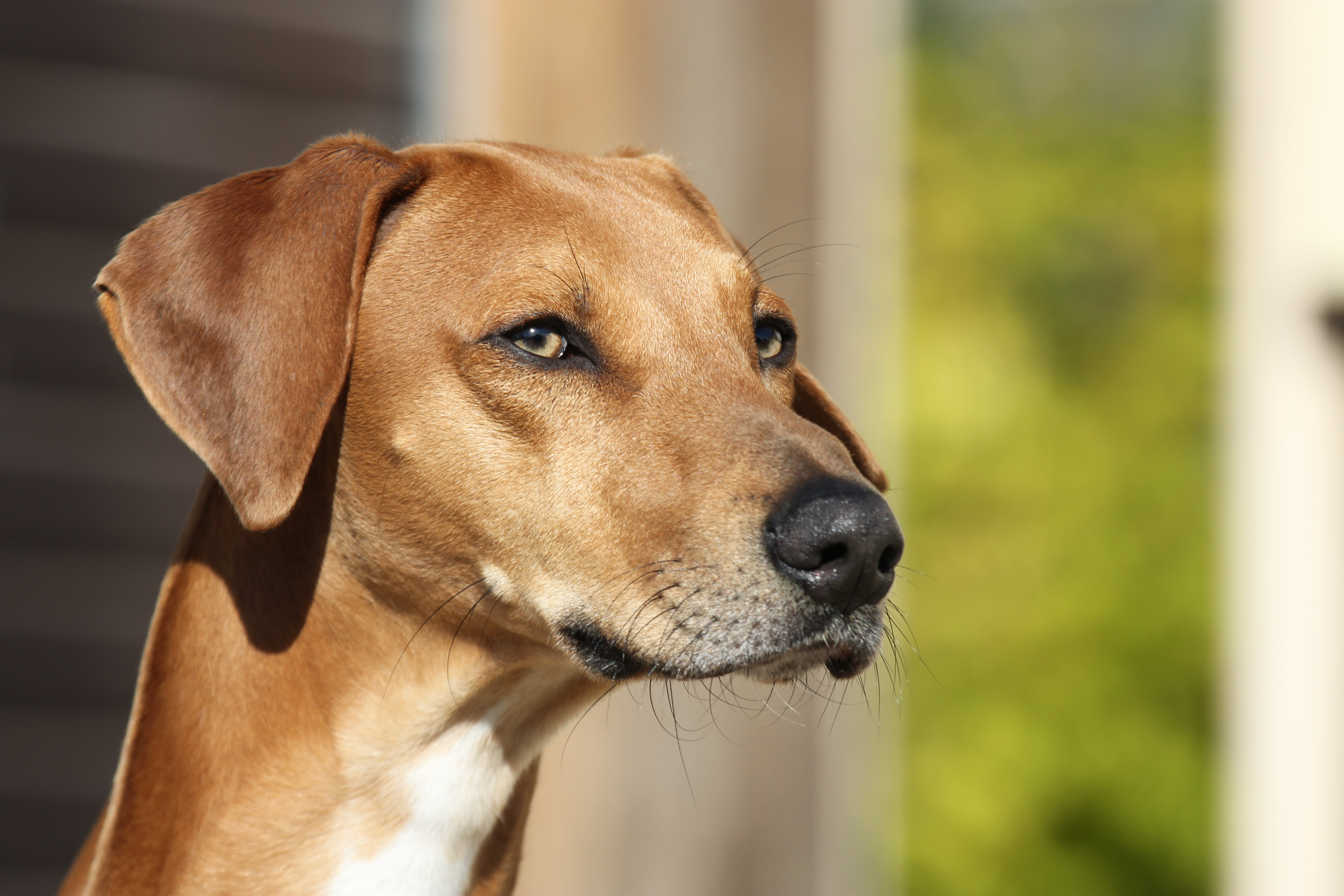 Portrait Azawakh Fahim Kel Az'Amour